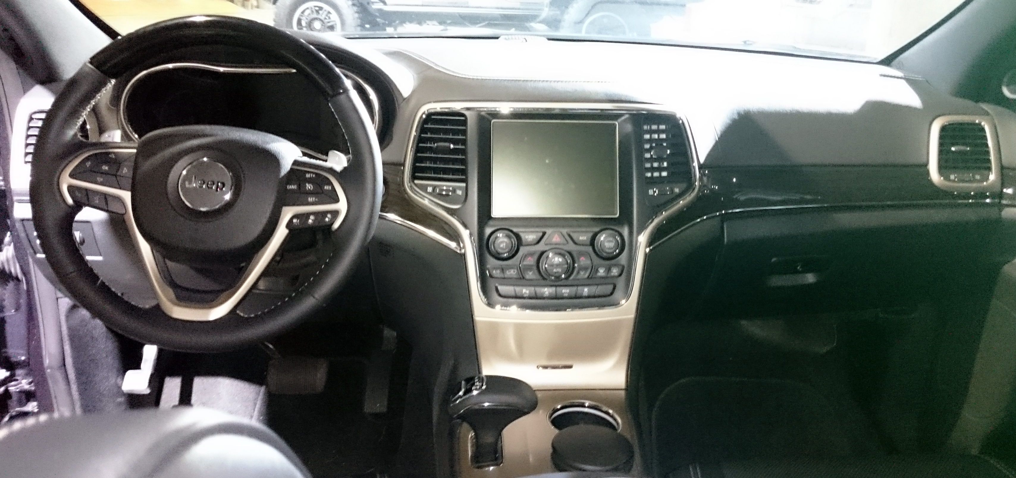 Showroom Jeep in Piazza Gae Aulenti (Milano)